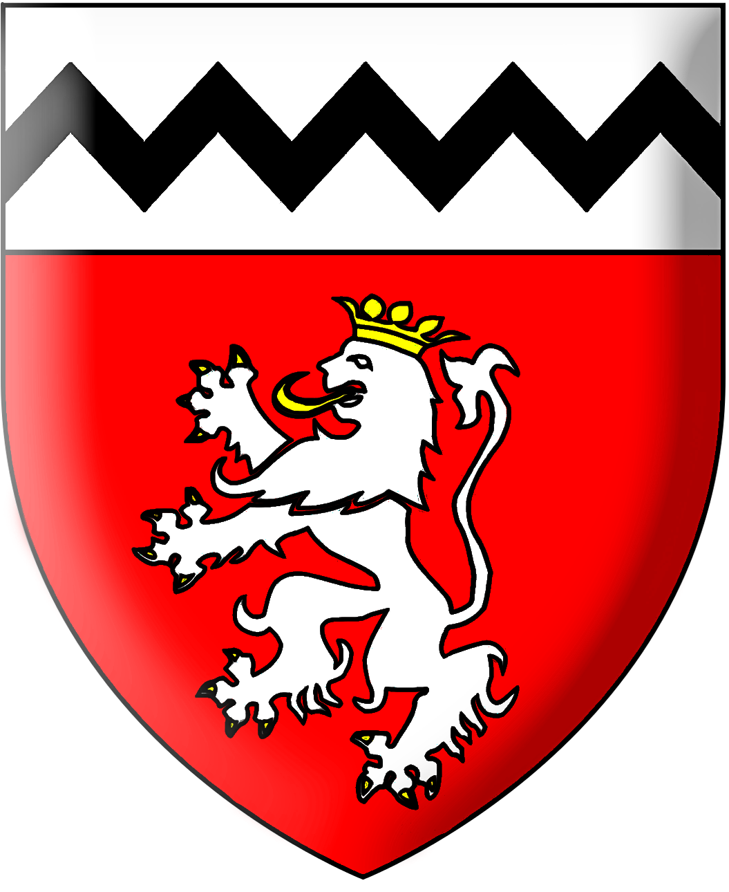 De gueules au lion d'argent, armé, lampassé et couronné d'or, au chef d'argent chargé d'une vivre de sable.